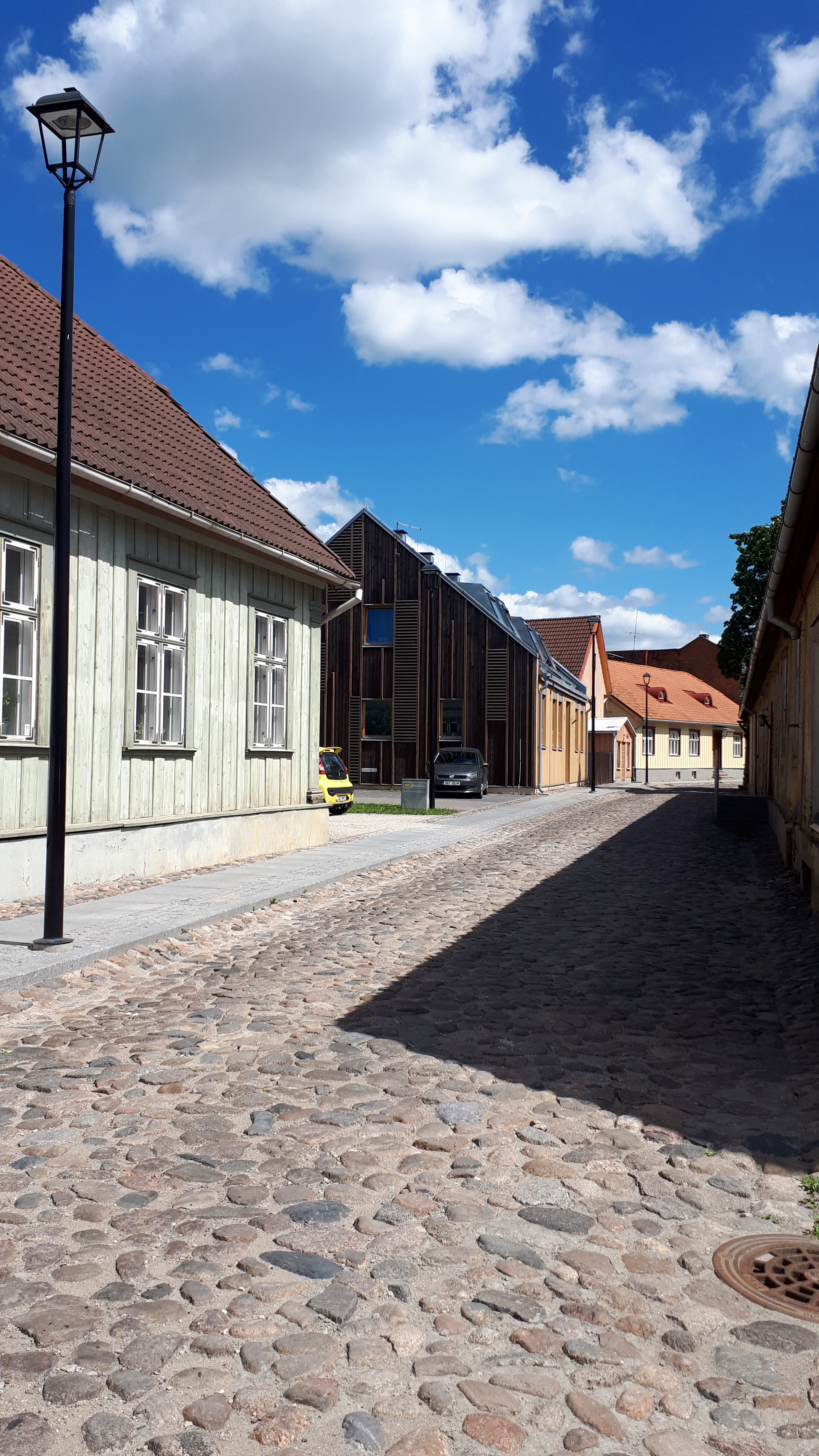 Ulica w Viljandi, Estonia.